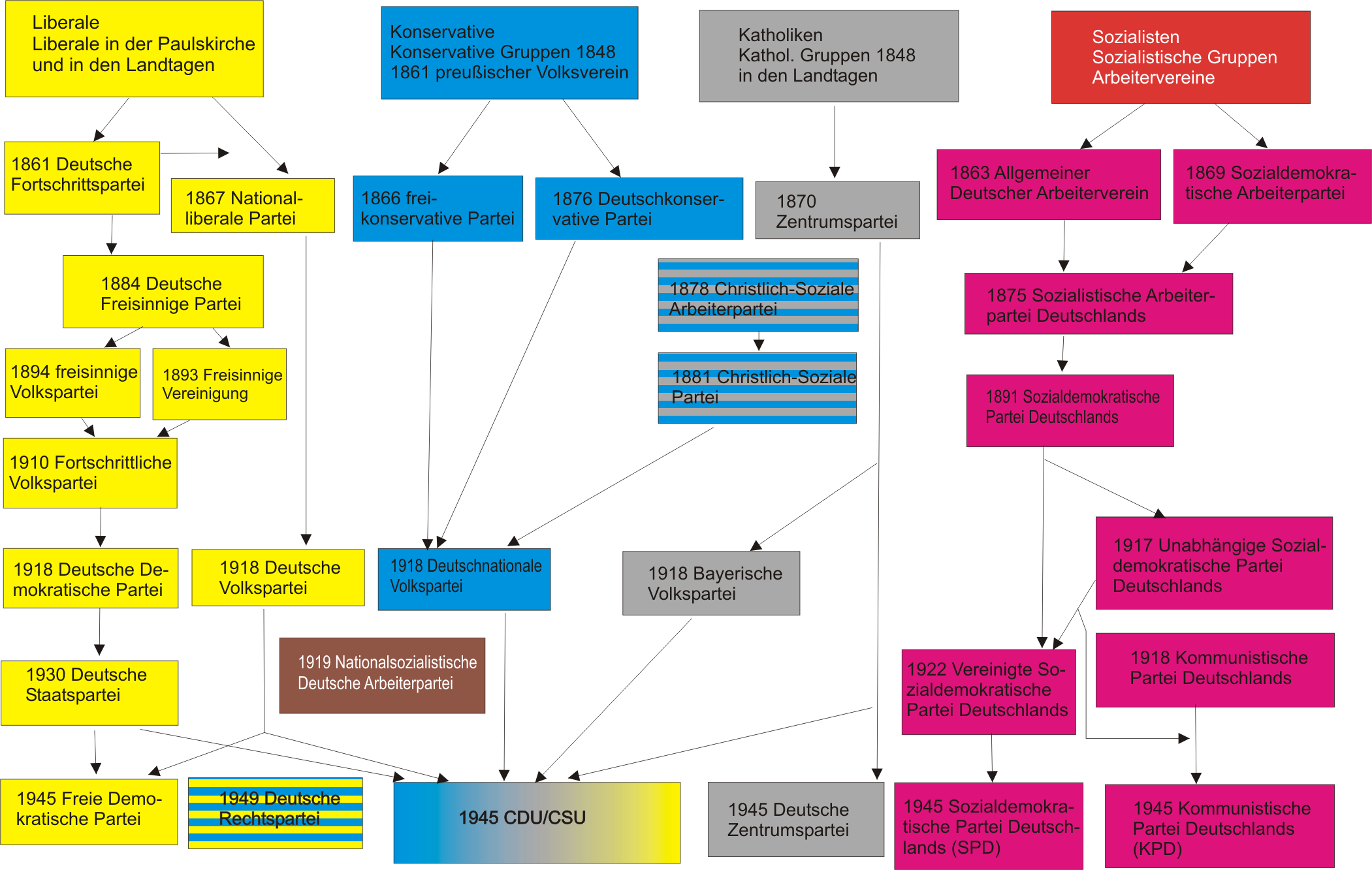 Dieses Bild zeigt den Stammbaum der deutschen Parteien, ausgehend von der Zeit des Paulskirchenparlamentes.